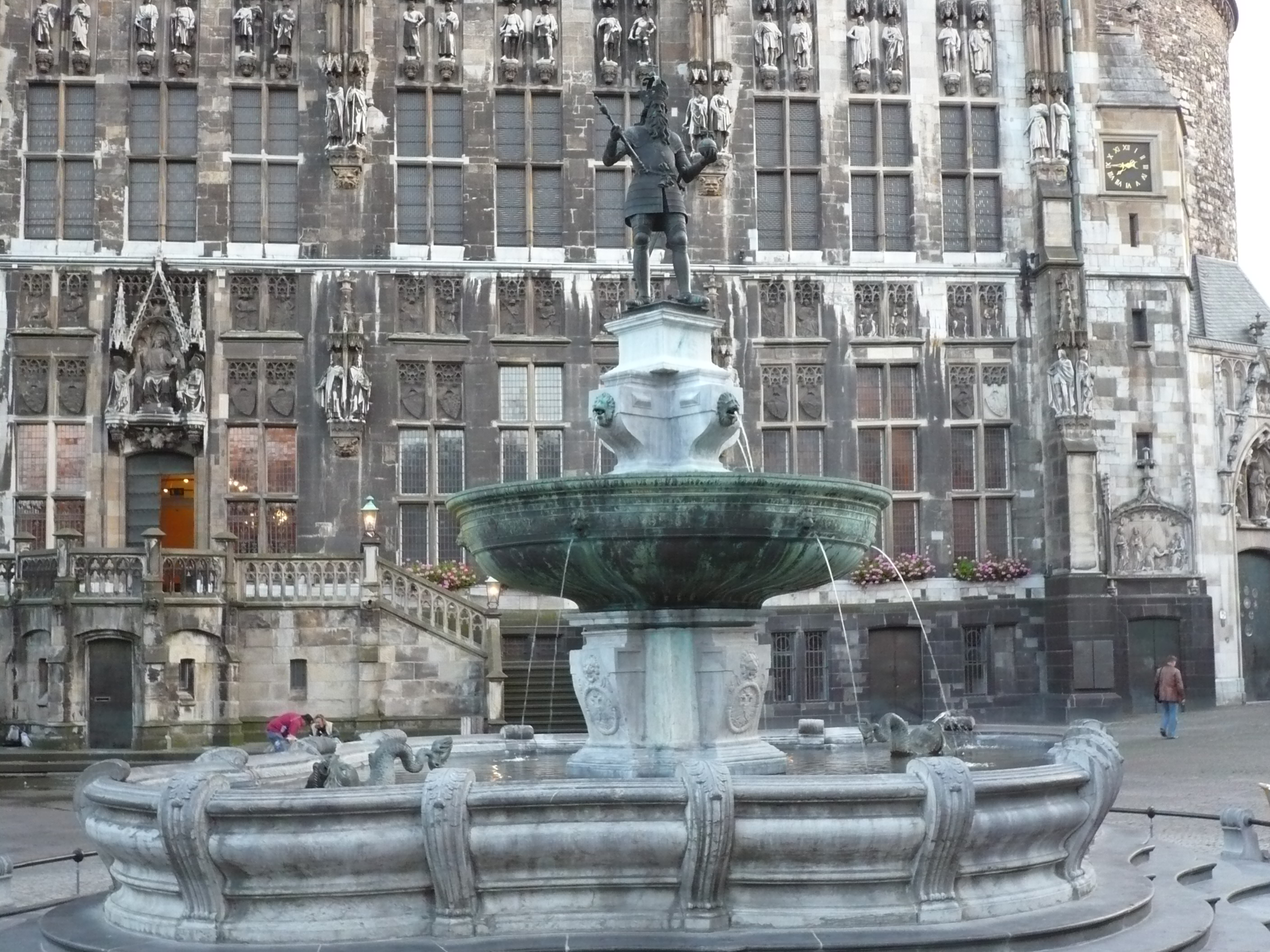 Karlsbrunnen (Aachen)